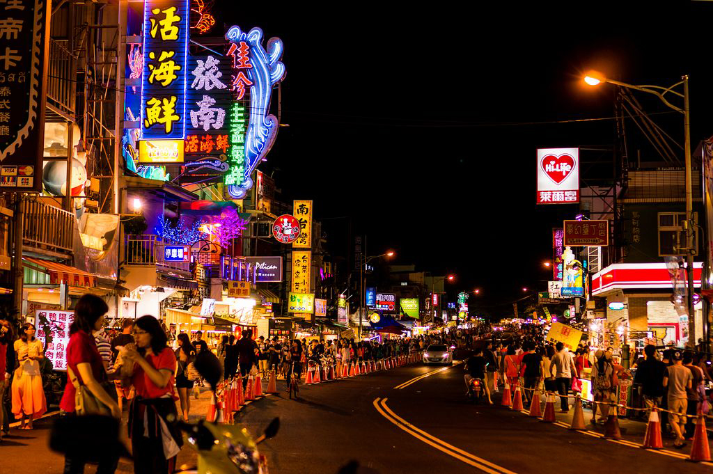 Кеньдин, главная улица